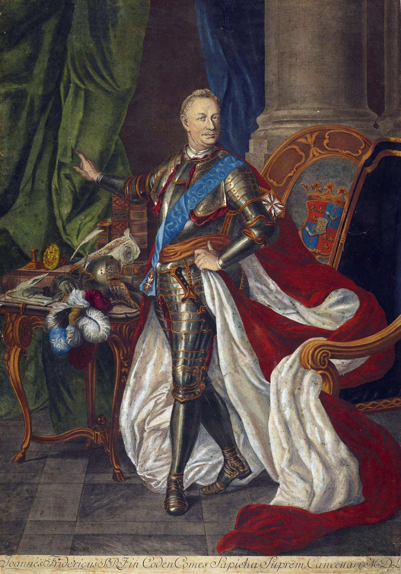 Беларуская (тарашкевіца): Партрэт Яна Фрыдэрыка Сапегі (Jan Fryderyk Sapieha) гербу «Ліс» (1680—1751), дзяржаўнага і вайсковага дзеяча Вялікага Княства Літоўскага, кашталяна менскага і троцкага, канцлера літоўскага..